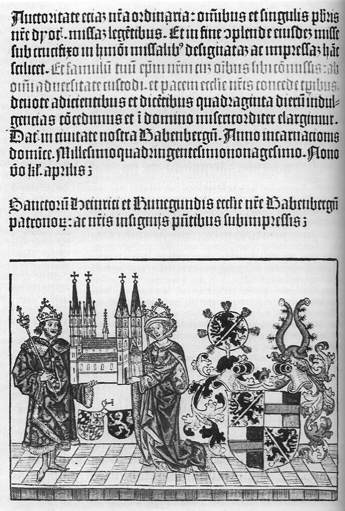 Missale Bambergense, Holzschnitt, Ausschnitt mit Bistumspatrone Kaiser Heinrich II. und Frau Kunigunde, Wappen des Bischofs Heinrich III. Groß von Trockau